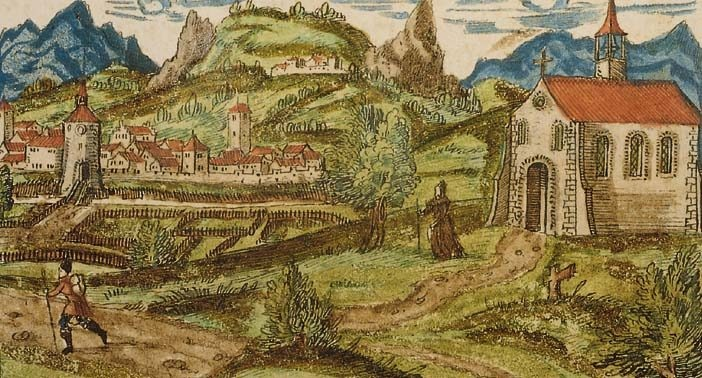 Das Kloster Königsfelden in der Schweizer Chronik (vollendet 1576) von Christoph Silberysen. Im Hintergrund die Stadt Brugg.